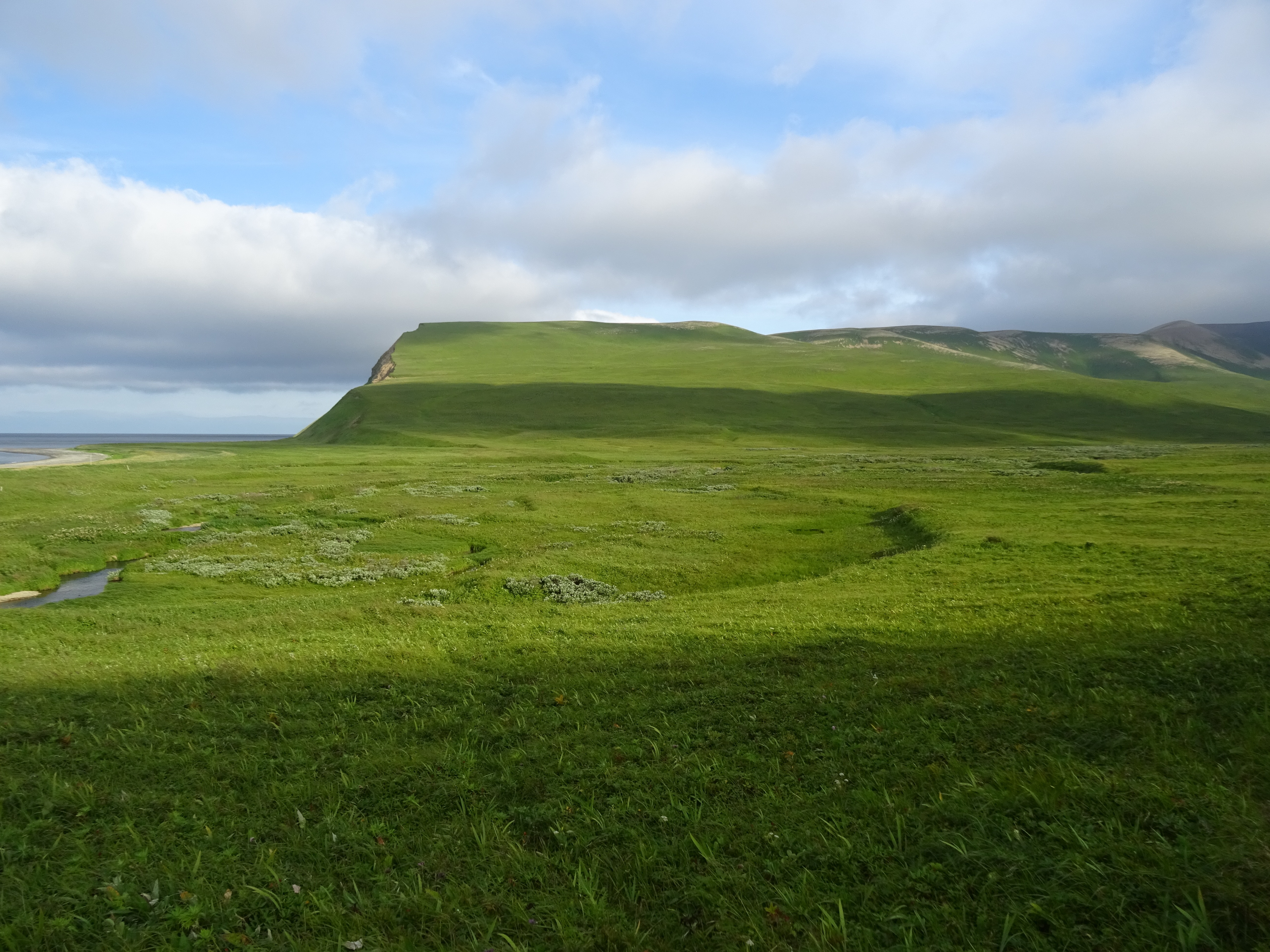 The lush greens of Bering Island -Isola di Bering